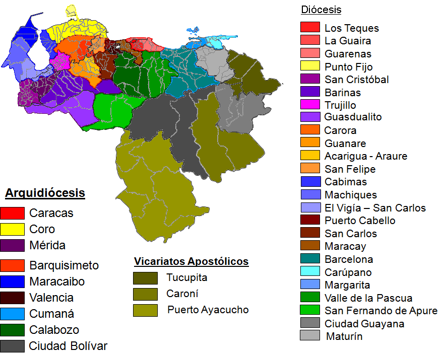 Arquidiócesis, diócesis y vicariatos apostólicos de la Iglesia Católica de Venezuela, o división eclesiástica de Venezuela. Inspirado en mapas similares de España y Portugal. Las arquidiócesis salen en color oscuro, las diócesis en tonos mas claros y del mismo color que la arquidiócesis de la que son sufragáneas, por ejemplo la arquidiócesis de Caracas es color rojo cardenal, mientras que las diócesis de La Guaira, Los Teques y Guarenas que son sufragáneas de esta están en rojos mas claros. Los vicariatos apostólicos de Puerto Ayacucho, Tucupita y Caroní, están en amarillo muy claro como en la bandera del Vaticano del que dependen directamente aunque pertenecen a la Conferencia Episcopal Venezolana. La diócesis de El Vigía - San Carlos del Zulia, sale en rayado diagonal de los colores azul y violeta oscuro porque depende de las arquidiócesis de Maracaibo y Mérida.